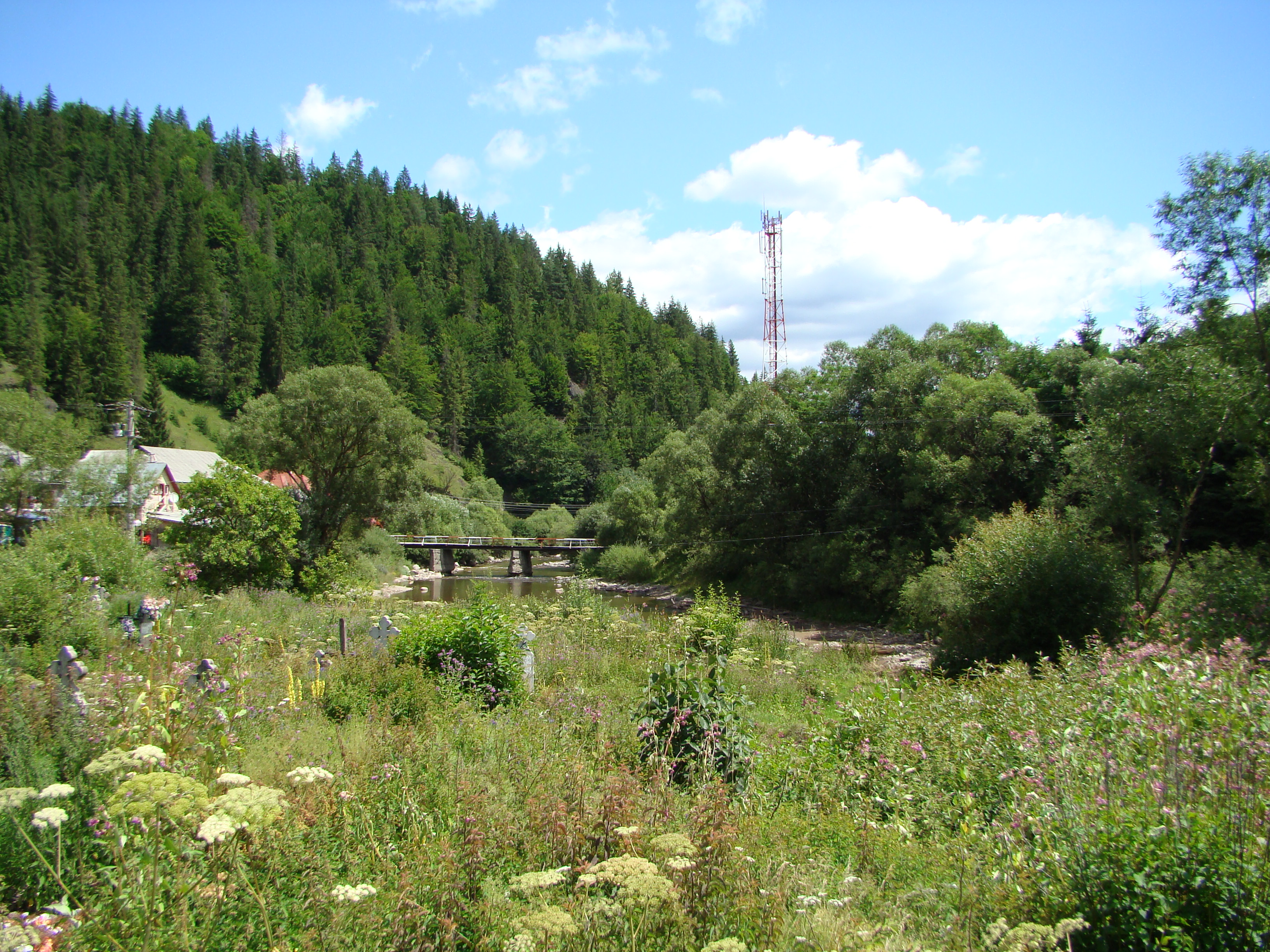 Comuna Gârda de Sus, judeţul Alba, România